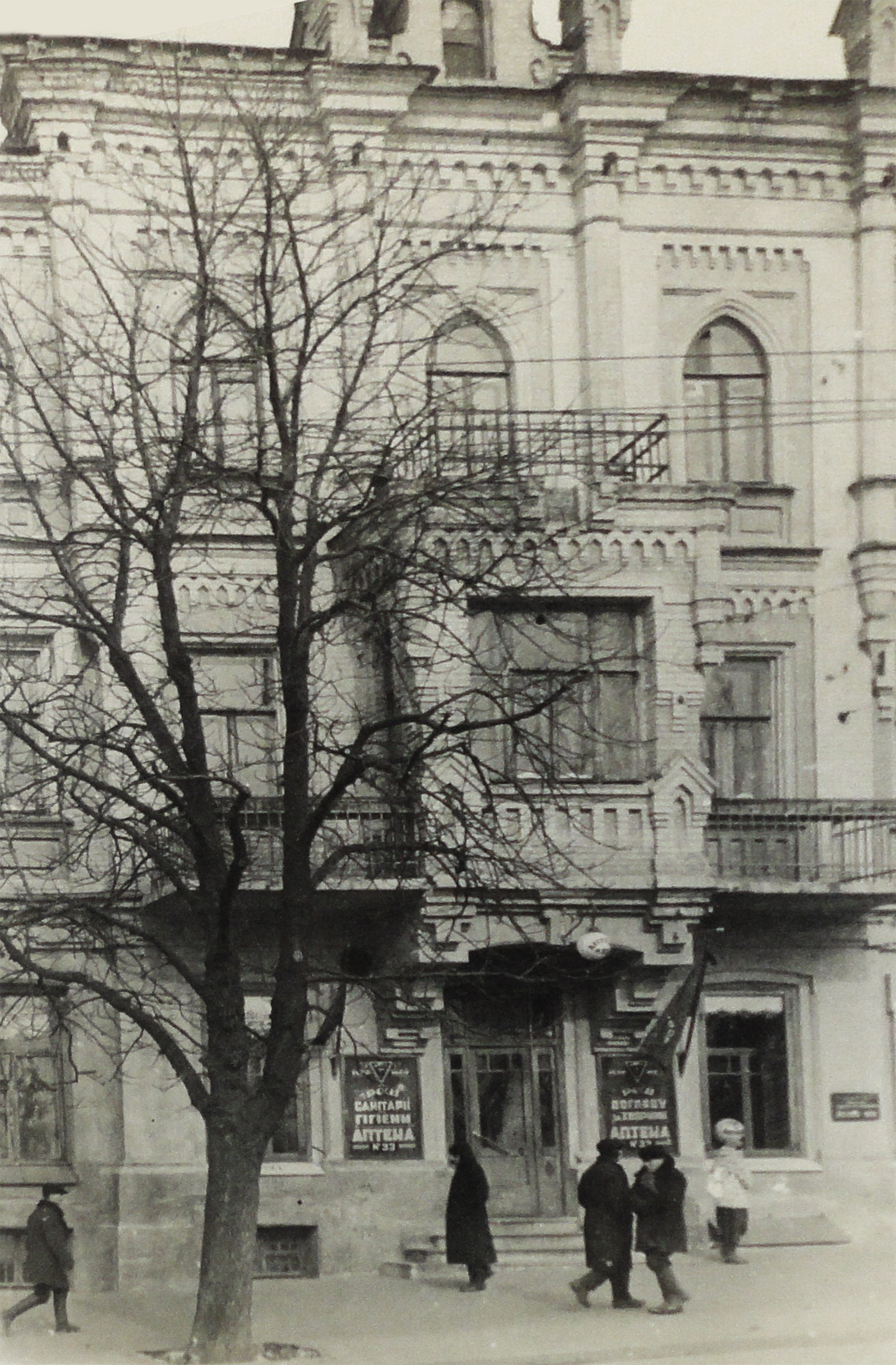 Аптека № 33 у приміщенні колишнього будинку аптекаря Фроммета. Київ